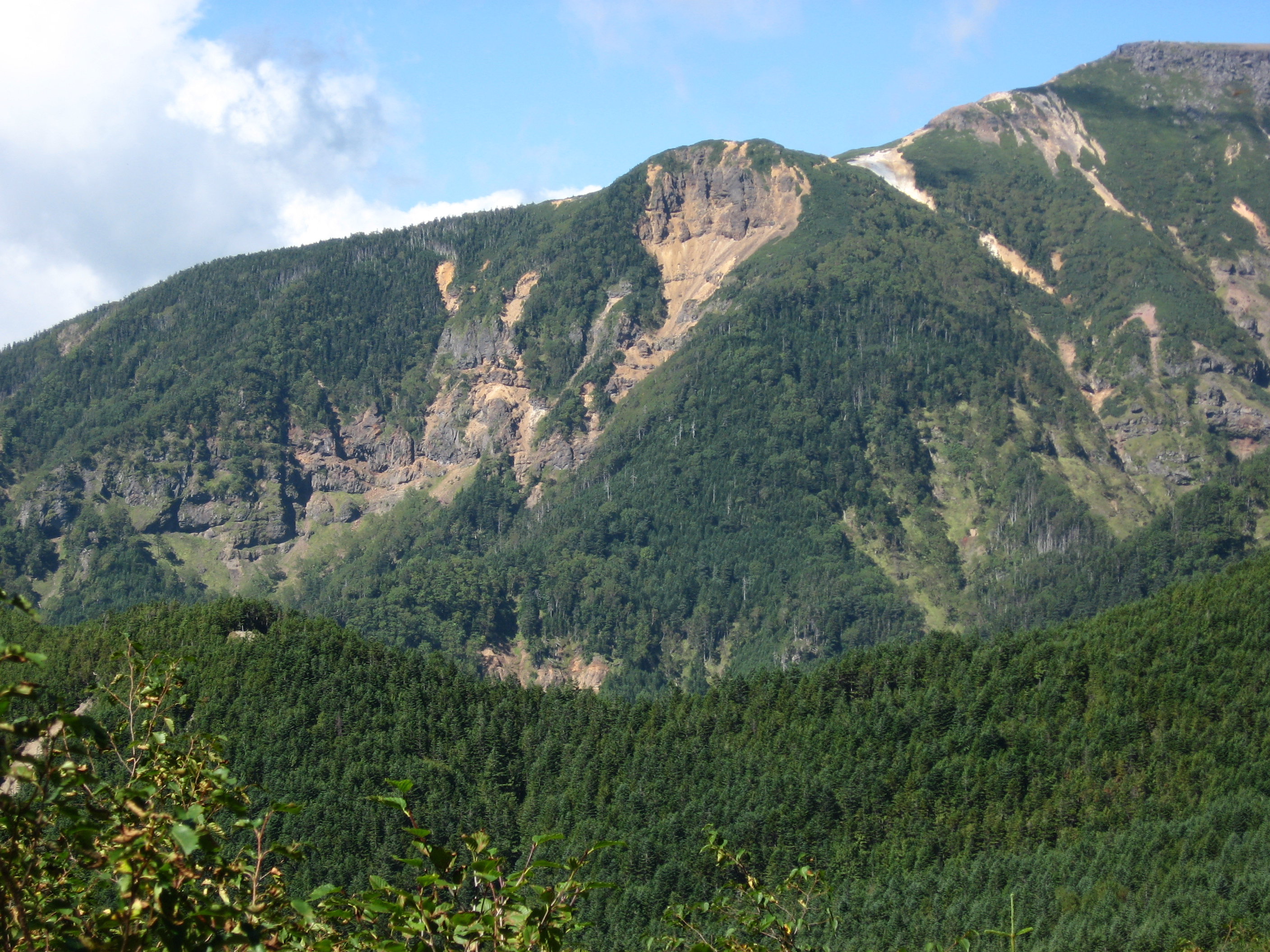 行者小屋付近より望む赤岩の頭